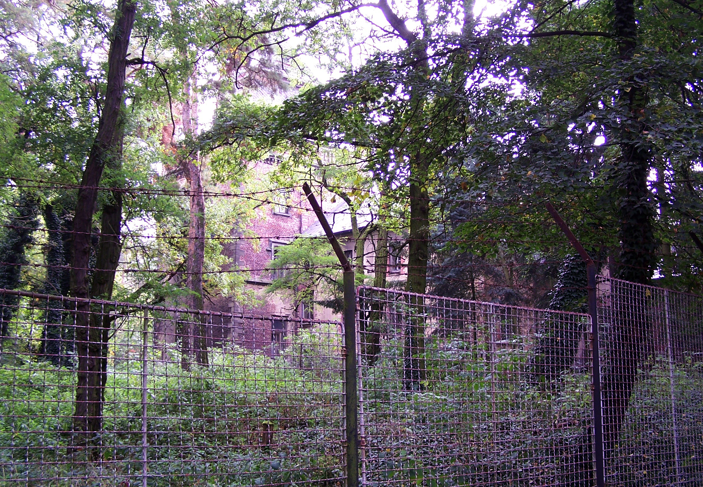 Pardubický Zámeček, dnes je zdevastovaná budova skryta v lesním porostu a za ostnatým drátem.